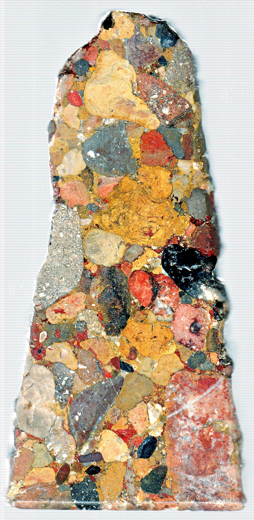 Срез конгломерата.